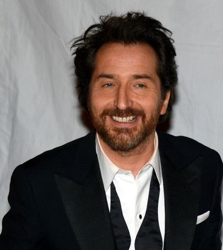 Édouard Baer à la cérémonie des César